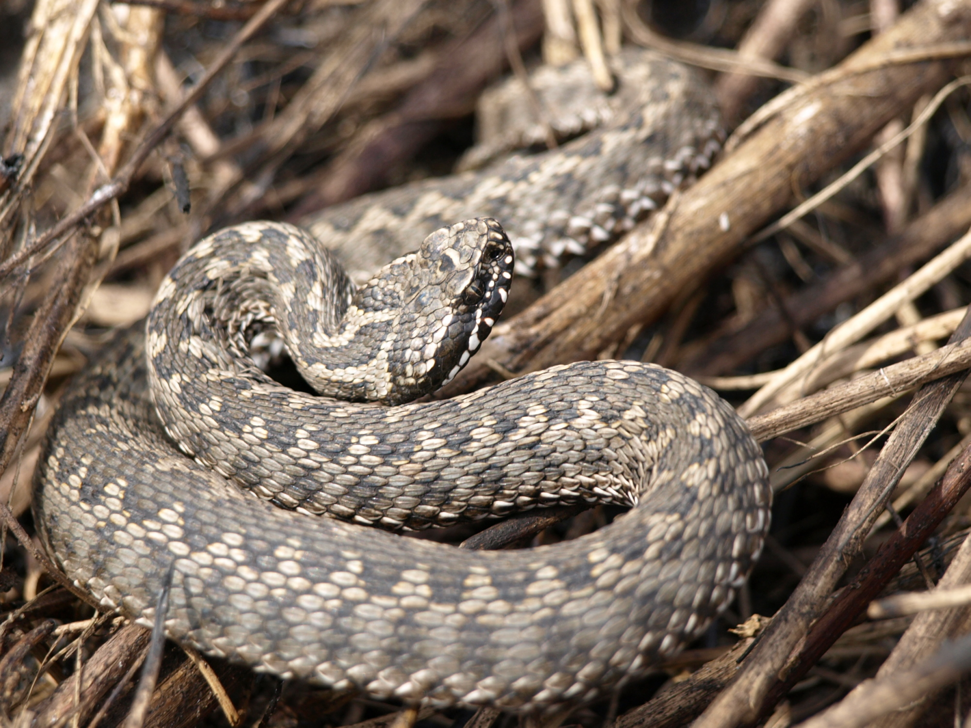 Степова гадюка